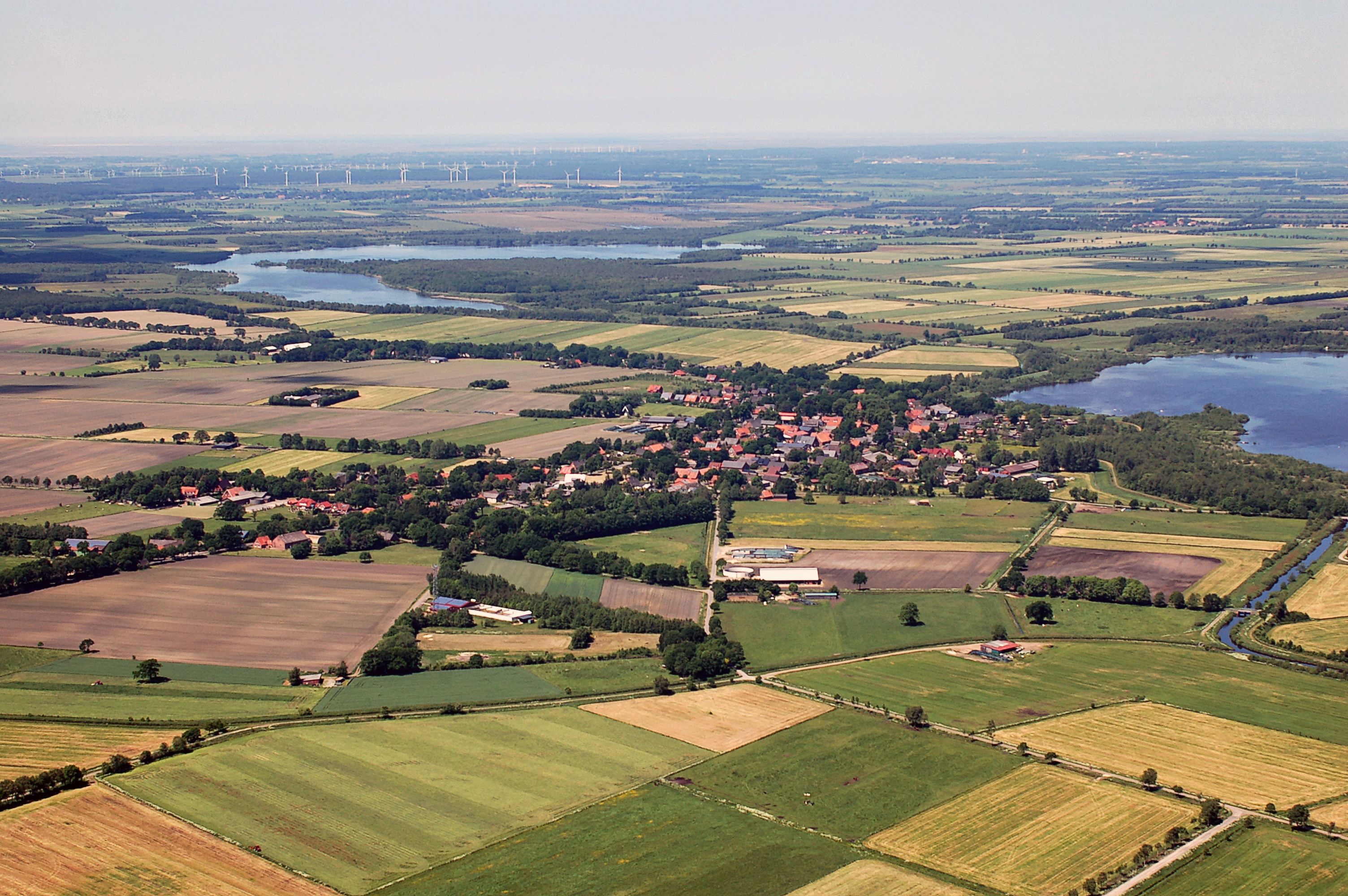 Luftbilder von der Nordseeküste 2012-05